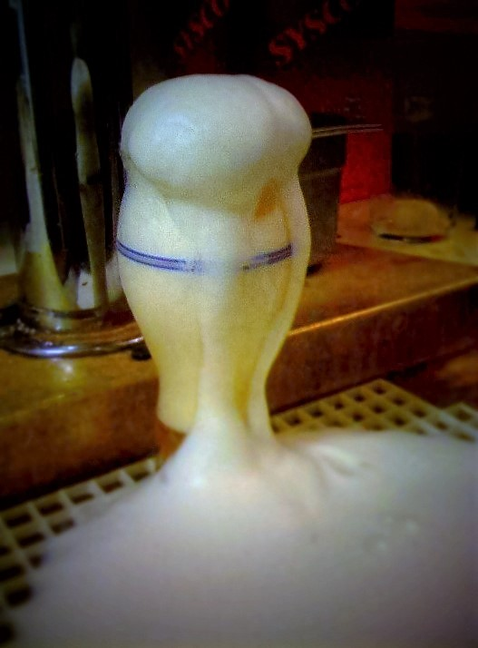 Übergeschäumtes beim Zapfen von Bier. Der Bierschaum fließt durch eine Gitter-Abdeckplatte in eine Auffangwanne unterhalb des Zapfhahns.